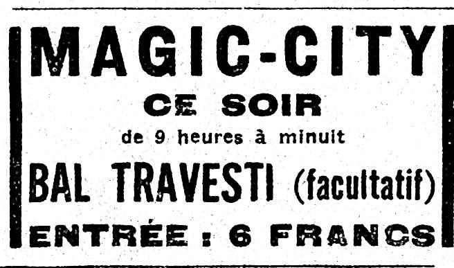 Annonce dans l'Intransigeant page 6, 5ème colonne, pour annoncer le bal de la Mi-Carême 1931 à Magic City. Cette année-là le cortège parisien de la Mi-Carême sort à une date tardive et décalée le dimanche 12 avril 1931.